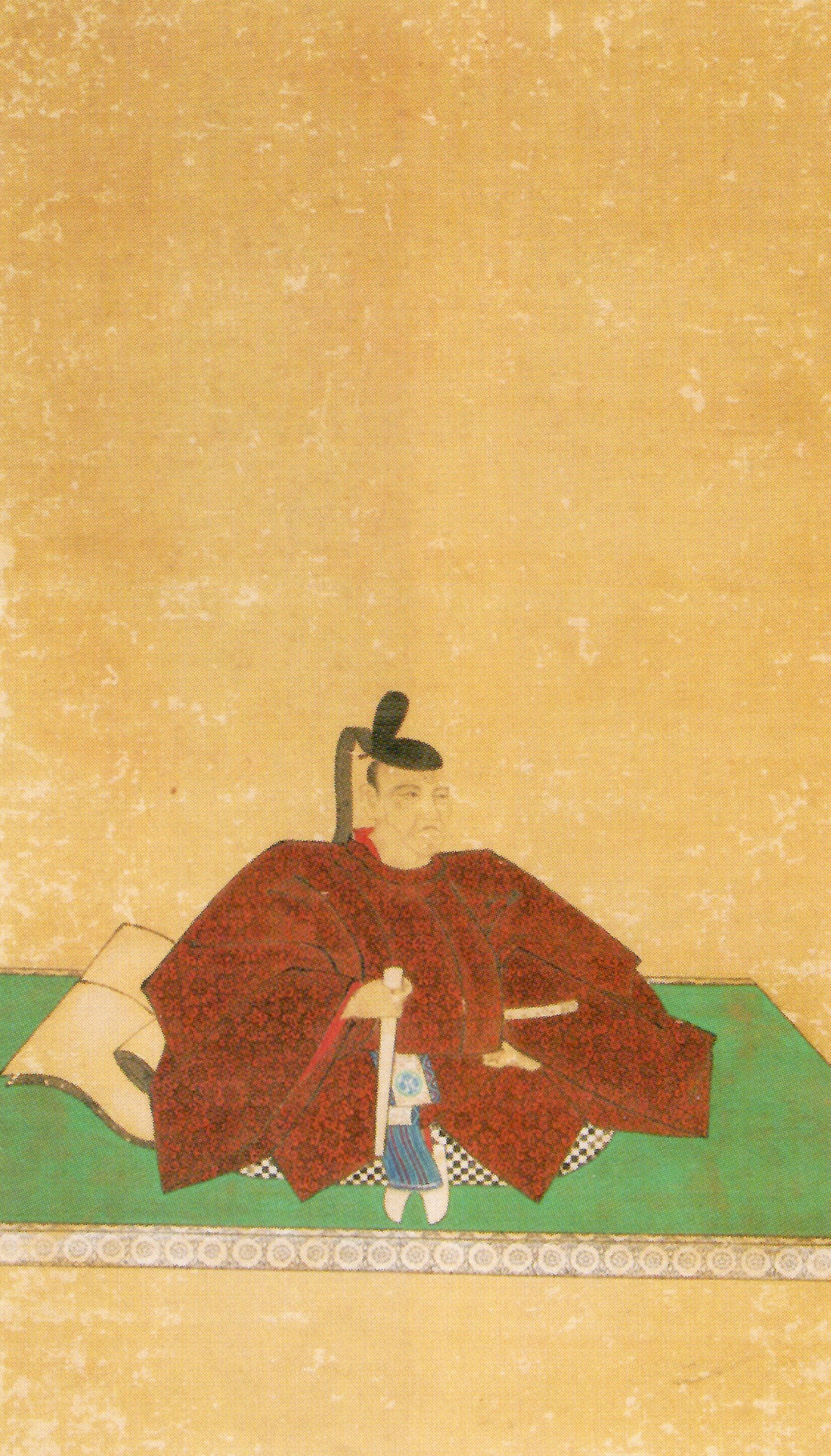 本多政行の肖像。